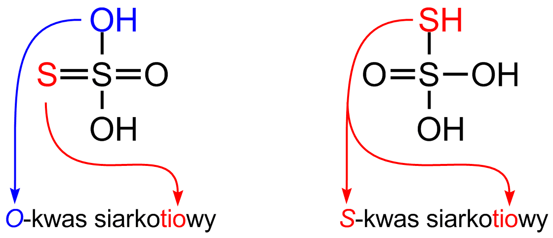 Nomenklatura wymiany funkcyjnej kwasów tiosiarkowych